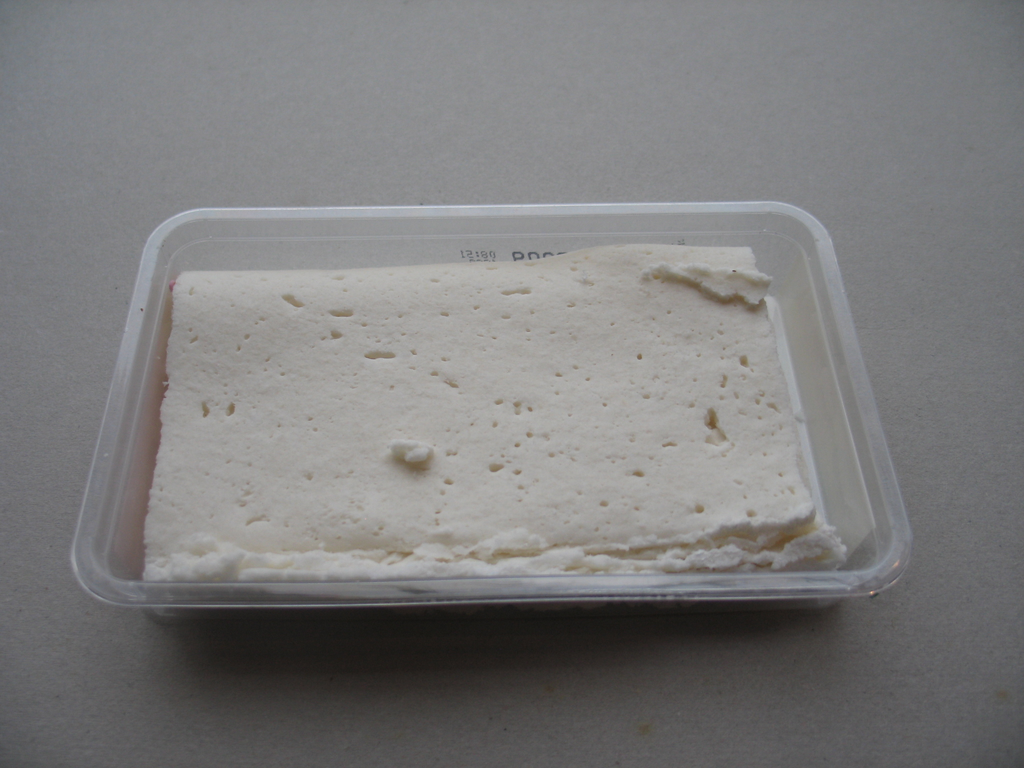 Kokosbrood